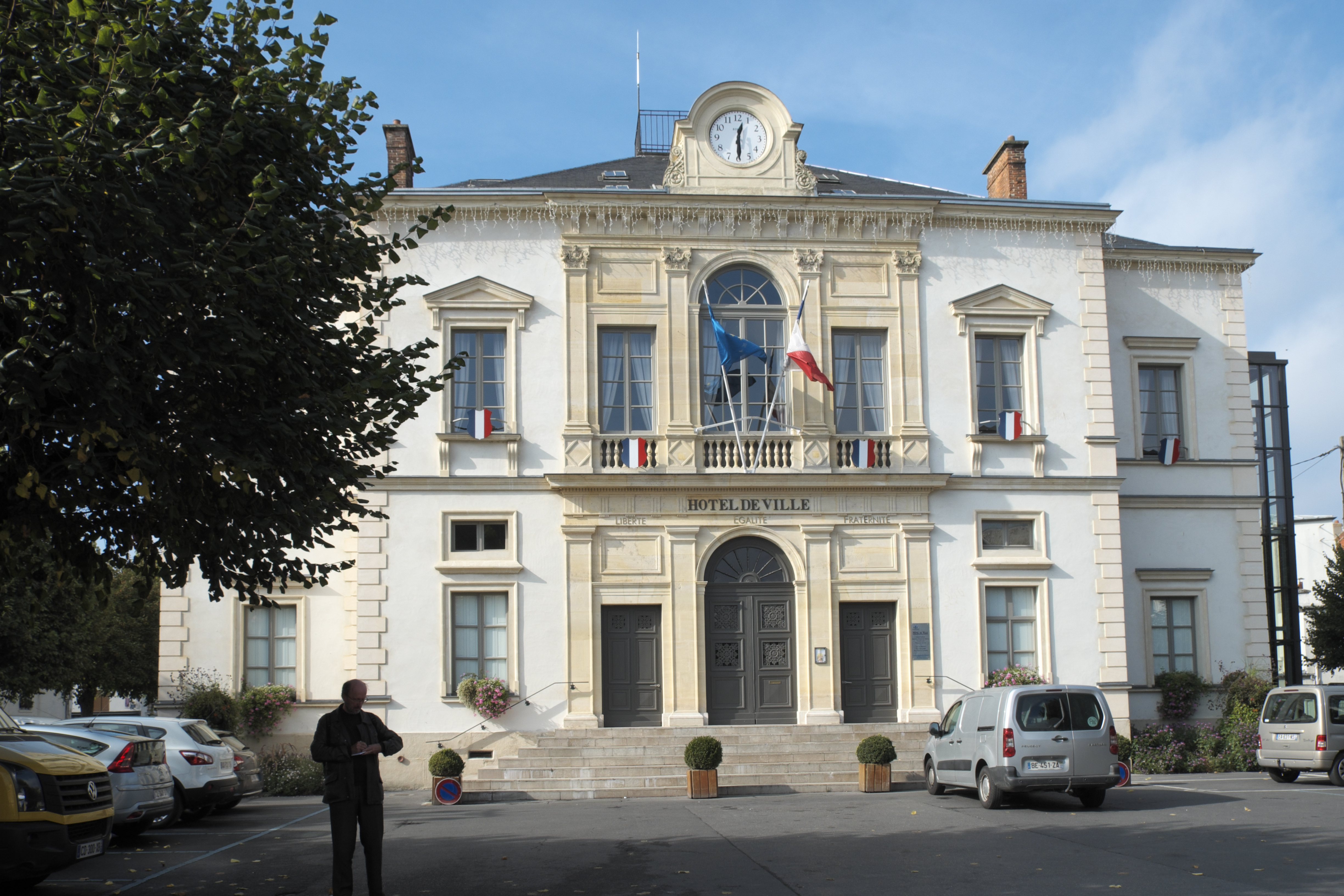 Rathaus in Coulommiers im Département Seine-et-Marne (Île-de-France/Frankreich)